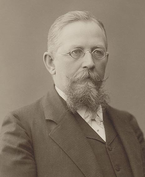 Porträtfotografie des Breslauer Chirurgen Carl Partsch